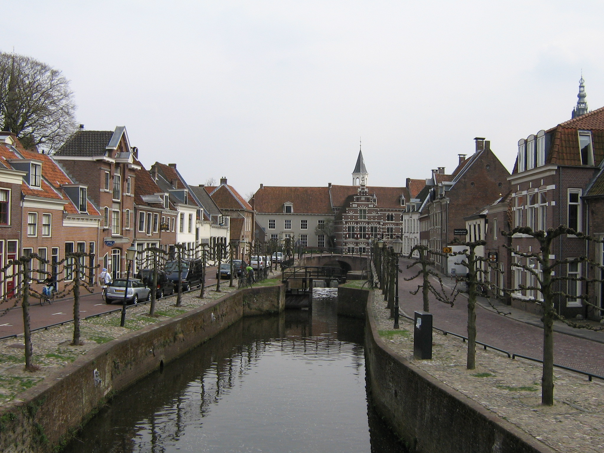 Amersfoort: Eem (gekanaliseerd)